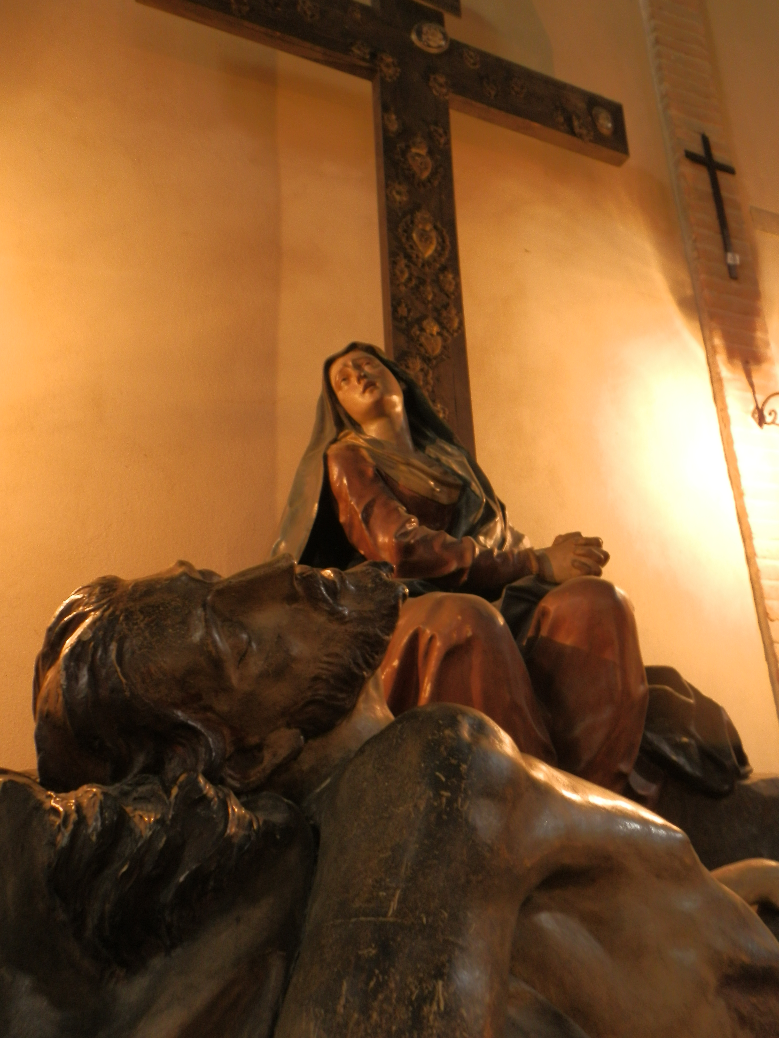 Piazza Santo Stefano - MIBAC This is a photo of a monument which is part of cultural heritage of Italy.